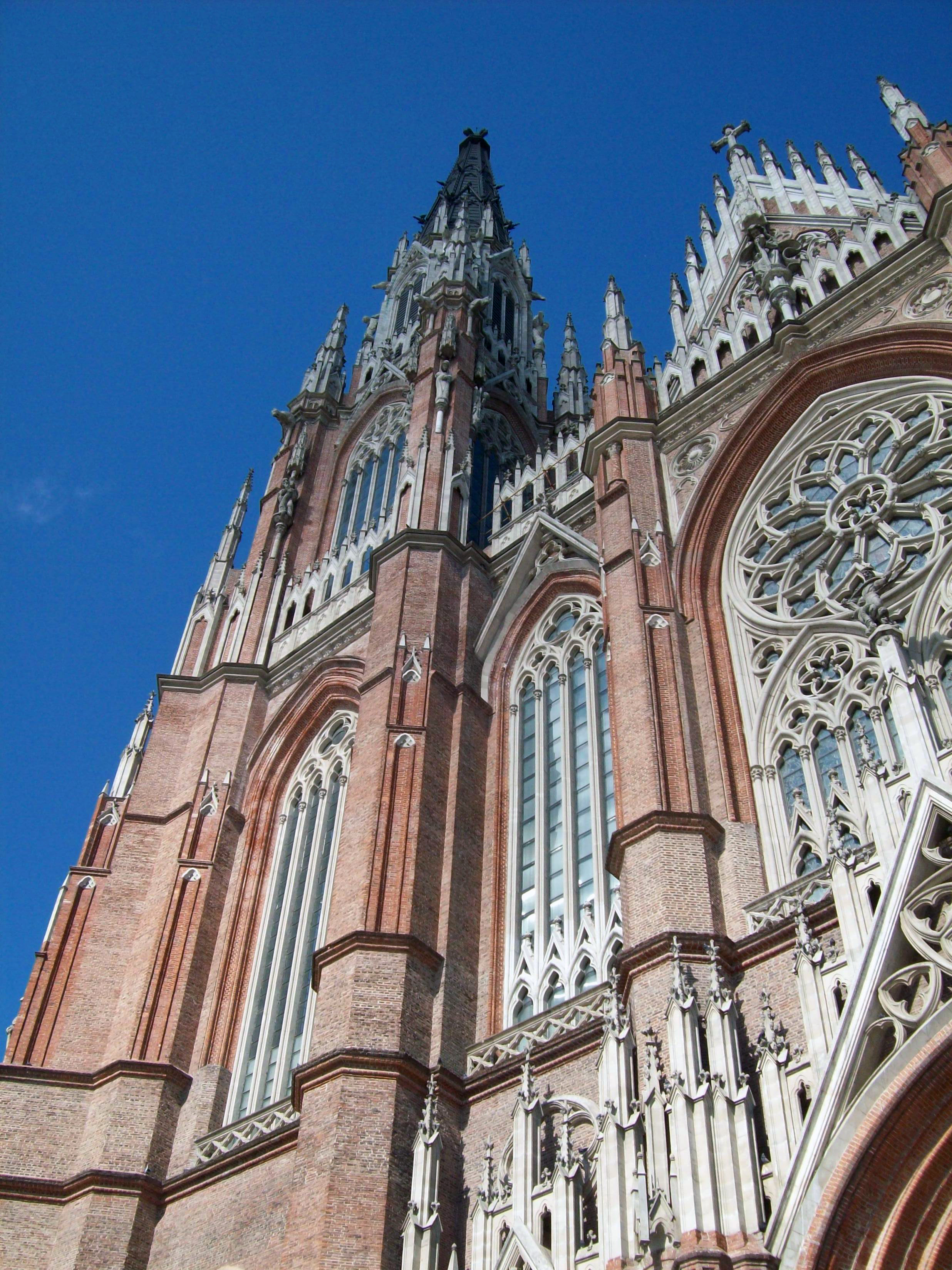 Torre Jesús de la Catedral de La Plata.